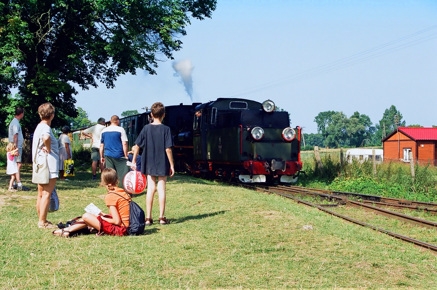 Nadmorska Kolej Wąskotorowa - wjazd pociągu na przystanek w Trzęsaczu (sierpień 2002)